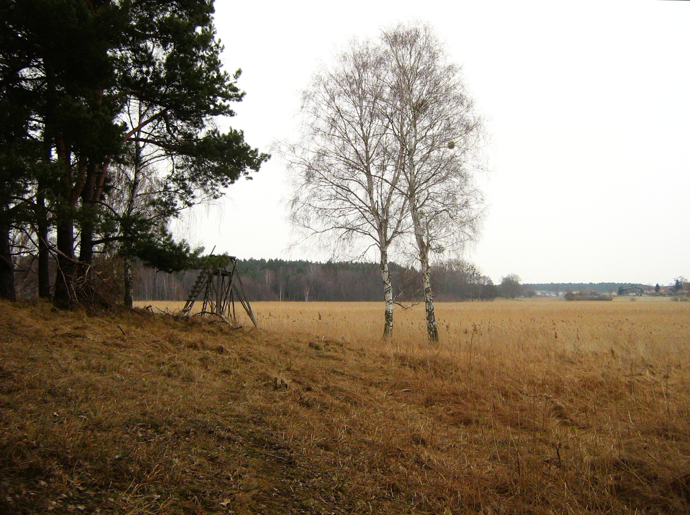 Blick über das Plöwensche Seebruch in Vorpommern (Landkreis Uecker-Randow).